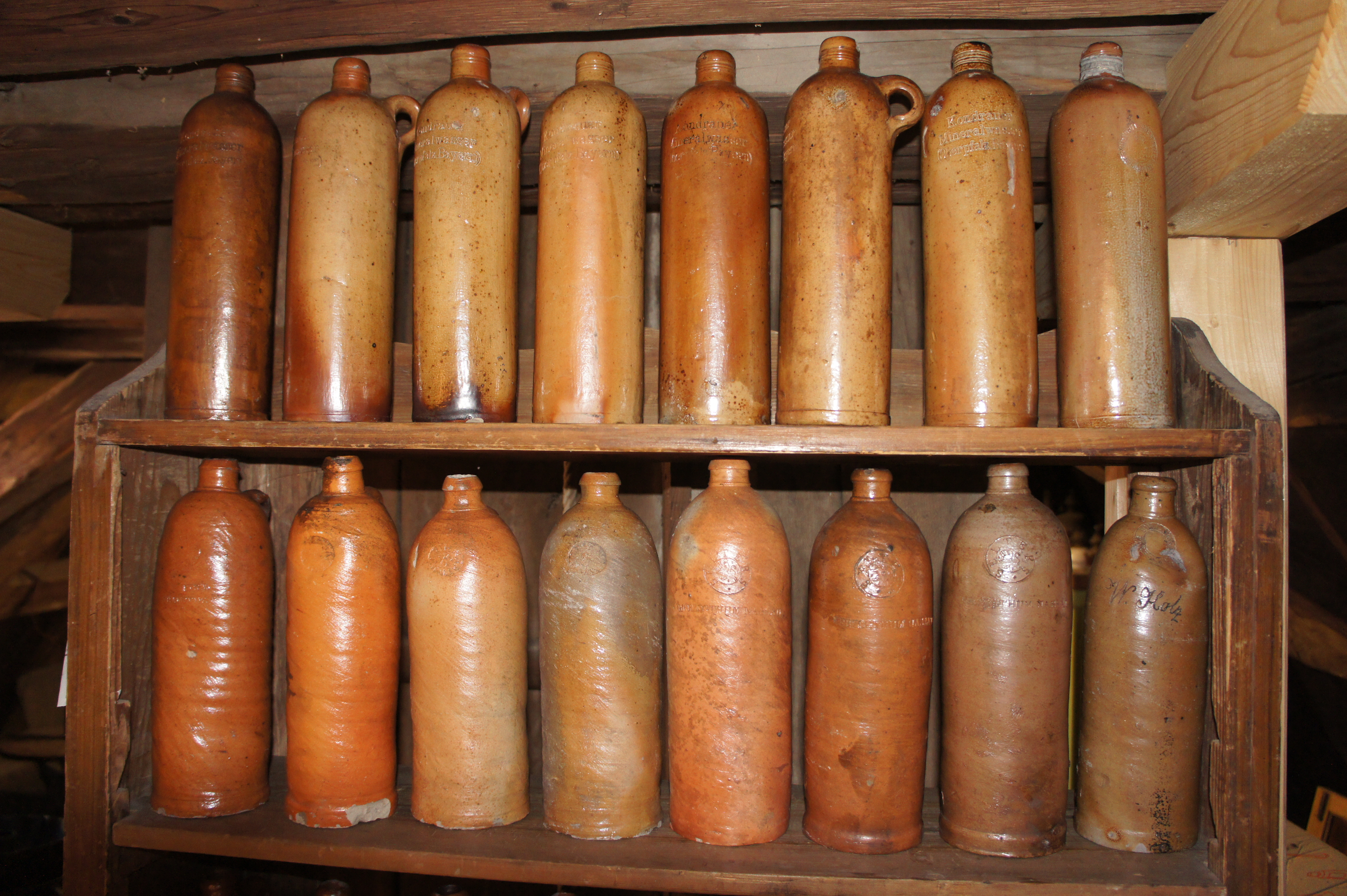 Schloss und Burganlage Grünsberg aus dem 13. Jahrhundert, Landsitz verschiedener Nürnberger Patrizierfamilien, seit dem 18. Jahrhundert im Besitz der Stromer, einer der ältesten und bedeutendsten Patrizierfamilien Nürnbergs. Burgkapelle, Dachbodenfunde, Mineralwasserflaschen